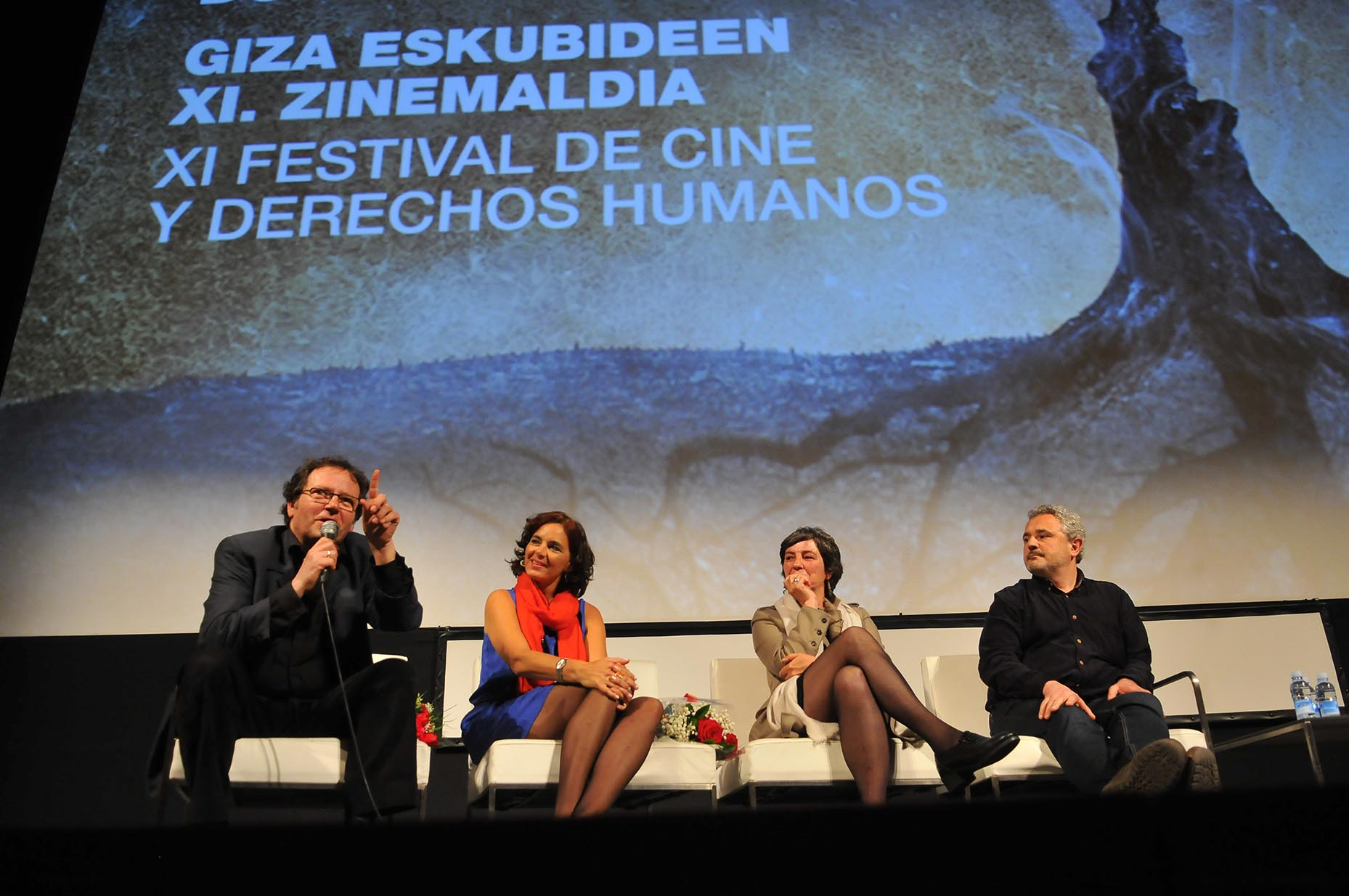 Alardearen Seme-Alabak solasaldian: Jone Karres eta Eneko Olasagasti (zuzendariak), Xabier Kerexeta (Irungo Alardezaleak), Ixabel Alkain Coloquio de Alardearen Seme-Alabak: Jone Karres y Eneko Olasagasti (directores), Xabier Kerexeta (Irungo Alardezaleak), Ixabel Alkain Argazkia / Fotografía: Iñigo Royo